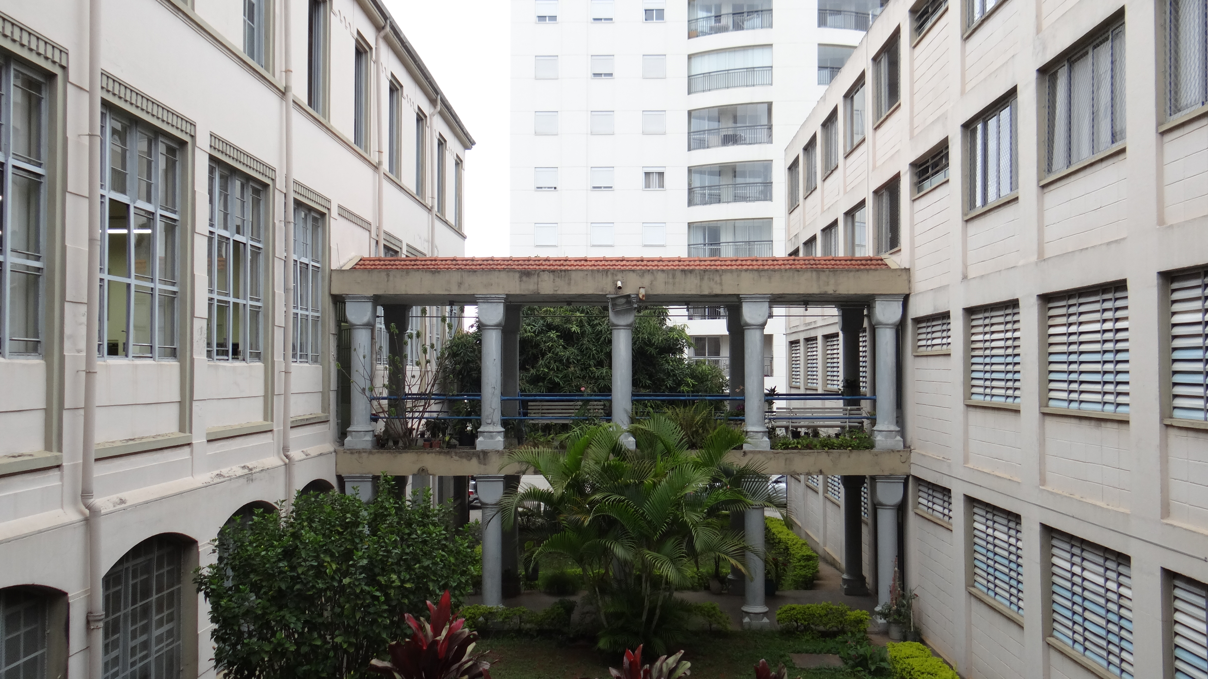 Passarela de acesso à Biblioteca Teológica Dom José Gaspar e ao Arquivo Metropolitano Dom Duarte Leopoldo e Silva no Seminário Central do Ipiranga, São Paulo (SP), Brasil.